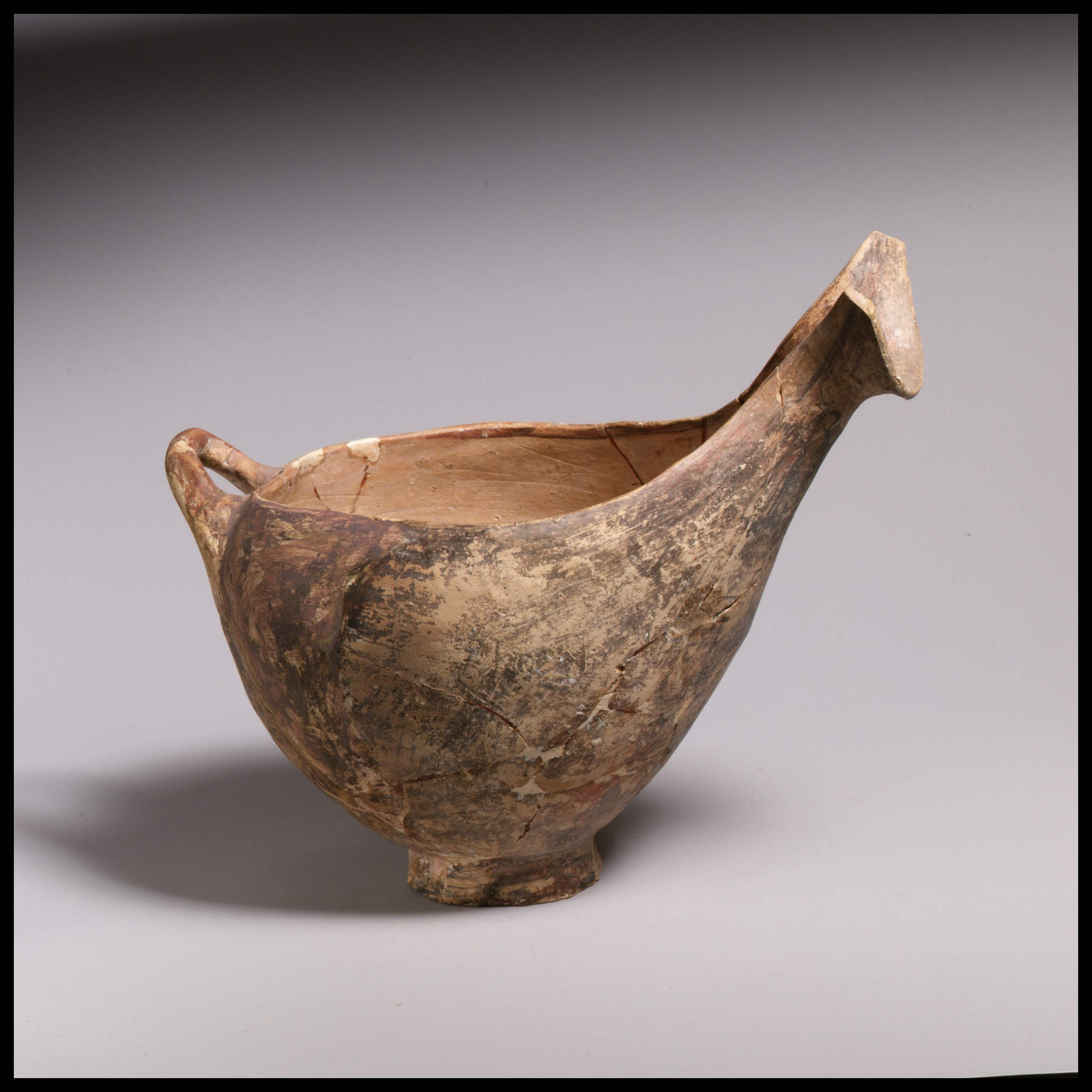 Helladic; Jug, sauceboat; Vases